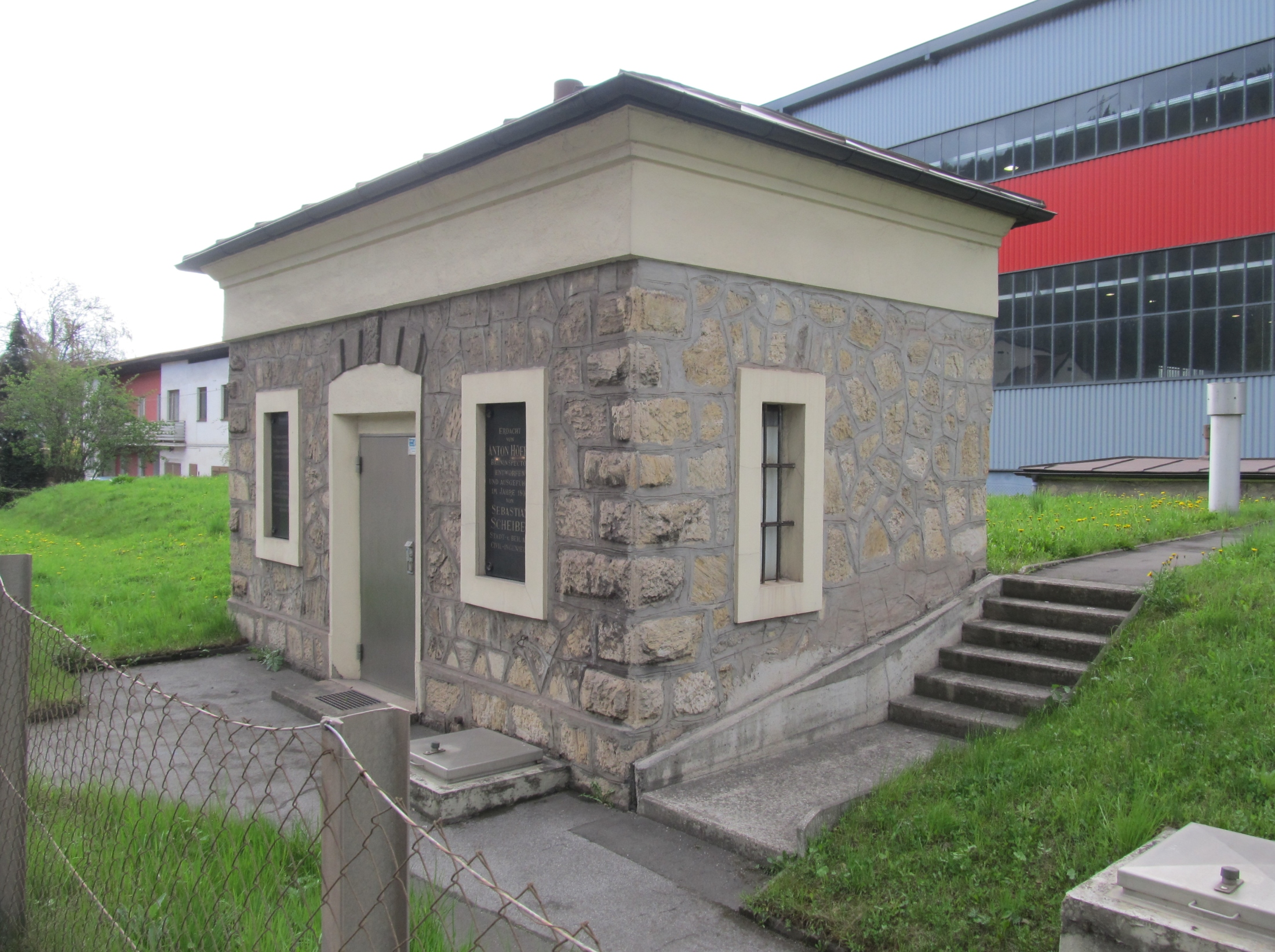 das Wasserreservoir Donawitz in Sankt Peter-Freienstein in der Steiermark